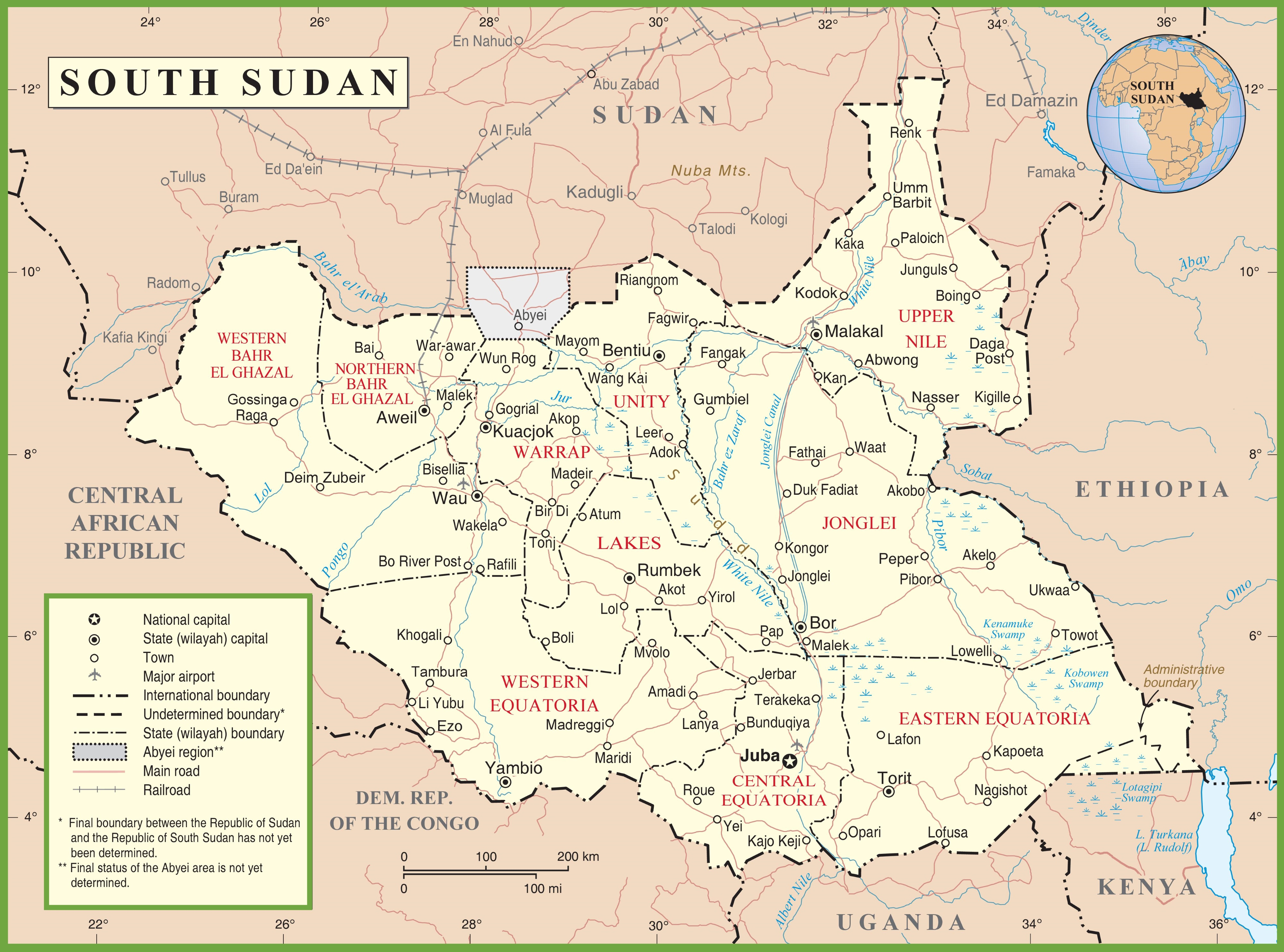 Mapa basado en una mapa de Naciones Unidas